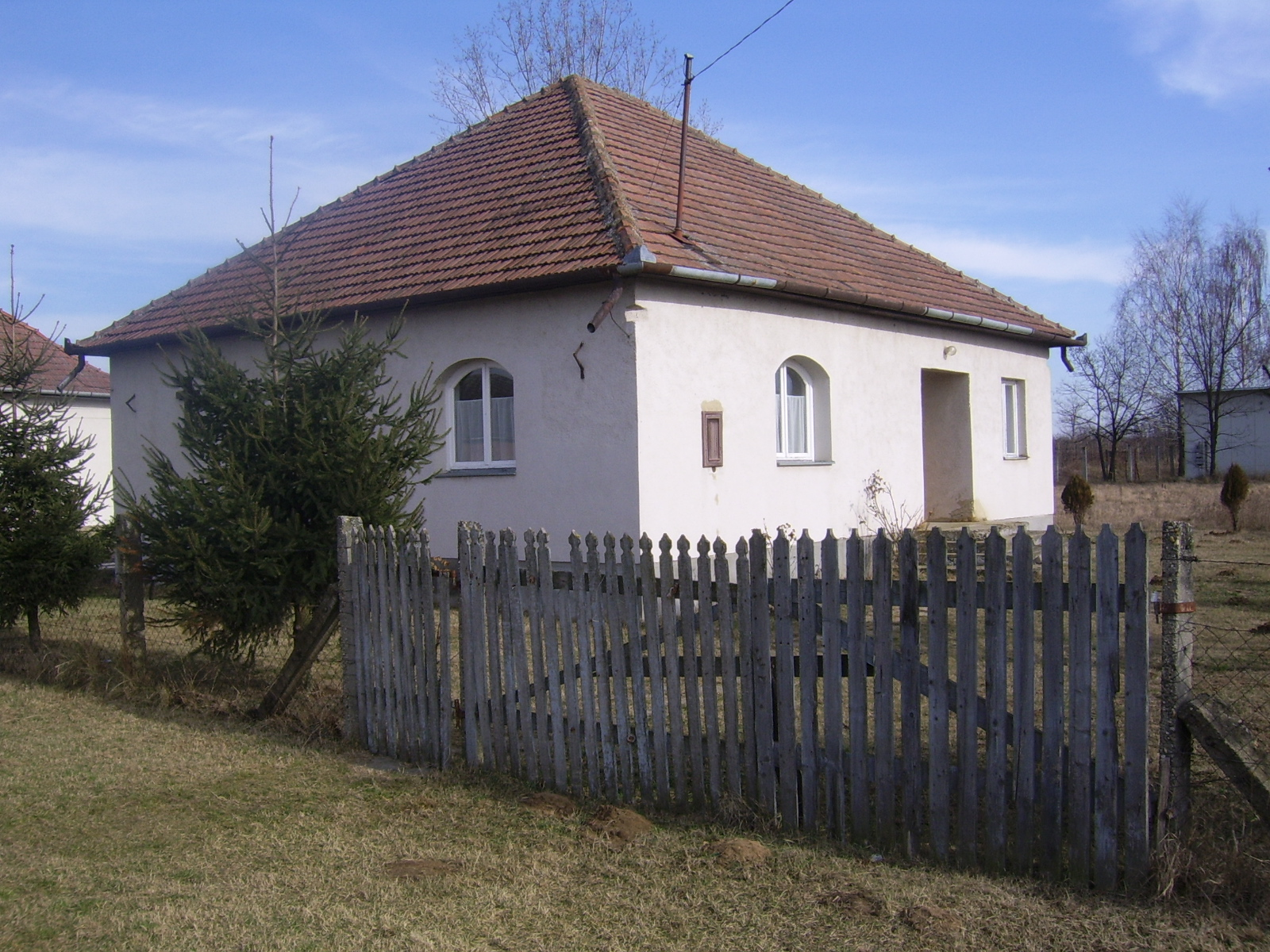 Balkány-Perkedpusztán található ökomenikus imaház (Balkány)